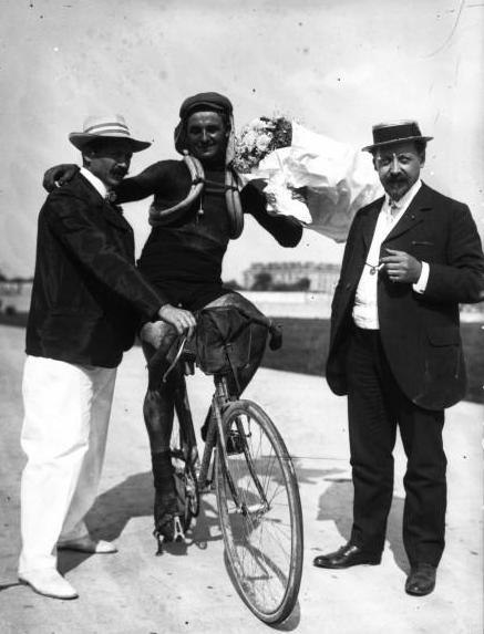 François Faber lors du Tour de France 1908